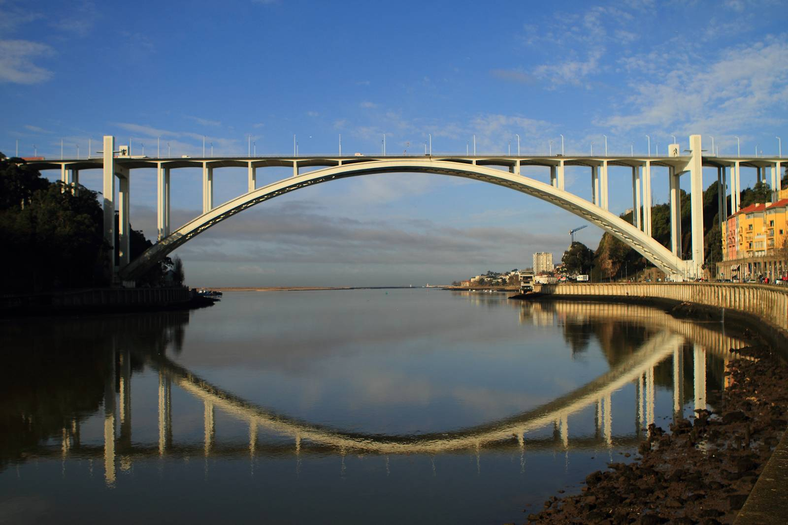 14.ª 19-02-2011